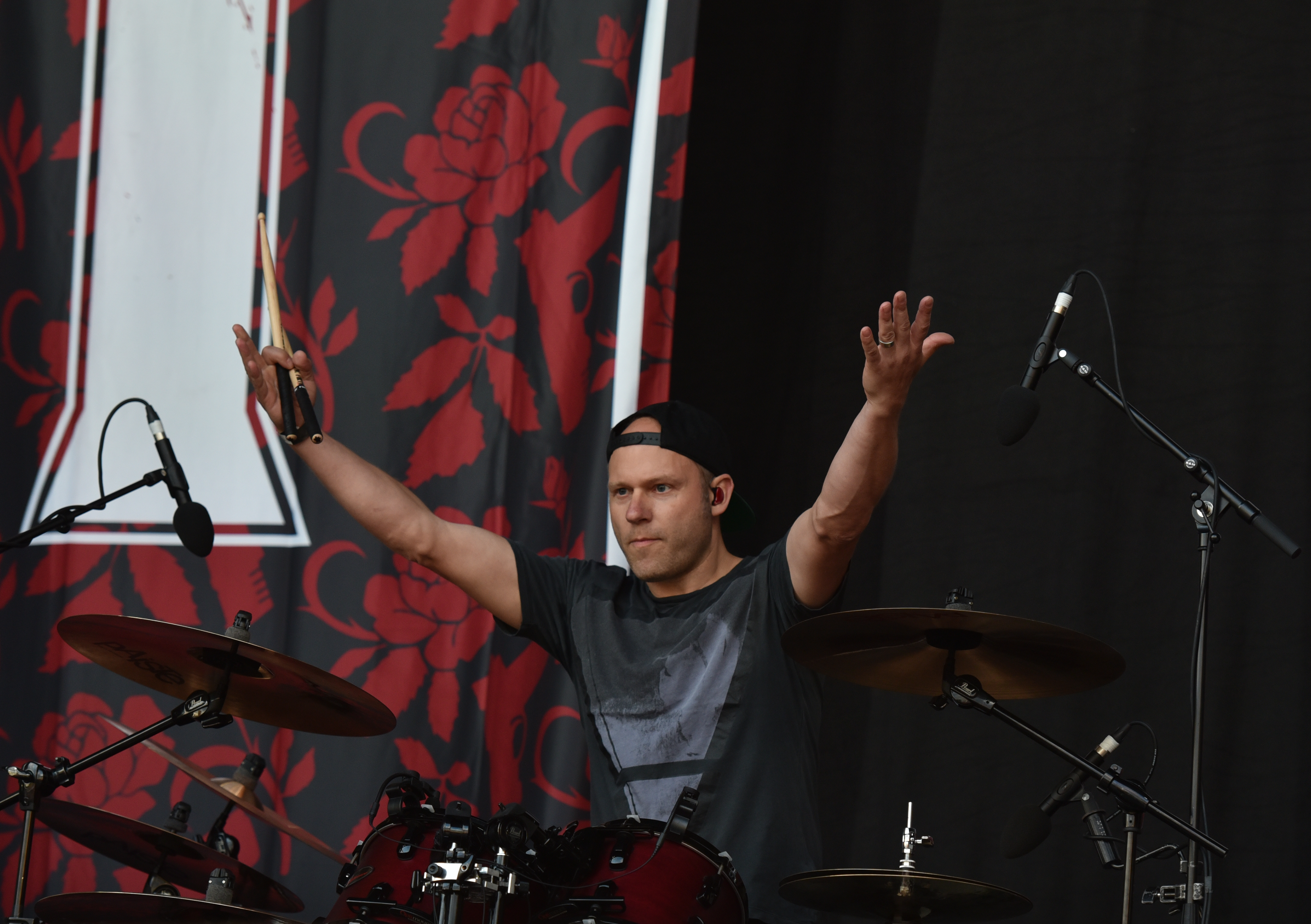 Bullet for My Valentine beim Reload Festival 2017